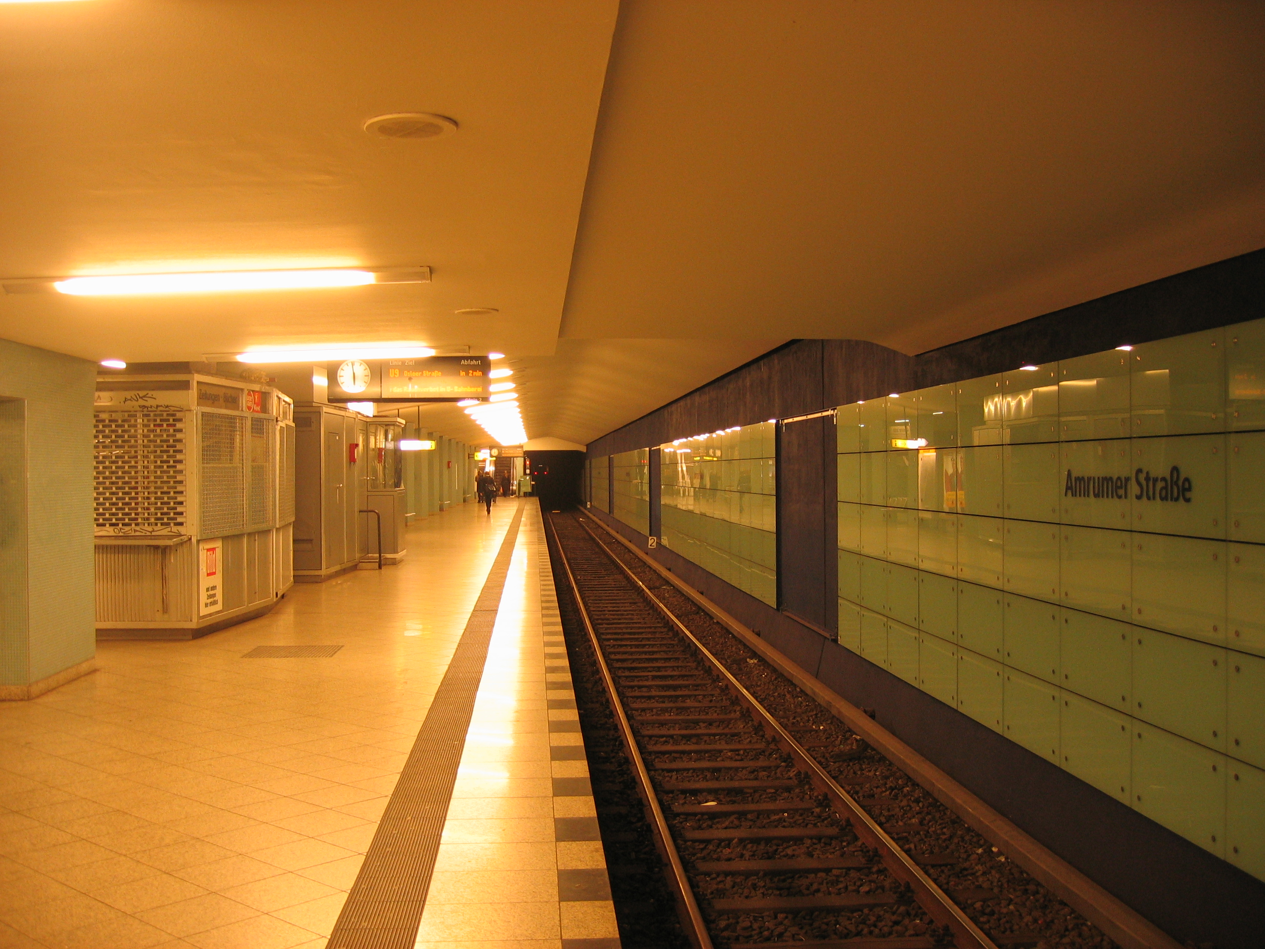 U-Bahnhof Amrumer Straße in Berlin